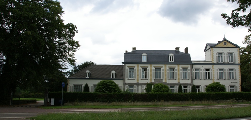 Rijksmonument 28035 - Withuishof, Bergerstraat 2-4, Maastricht.